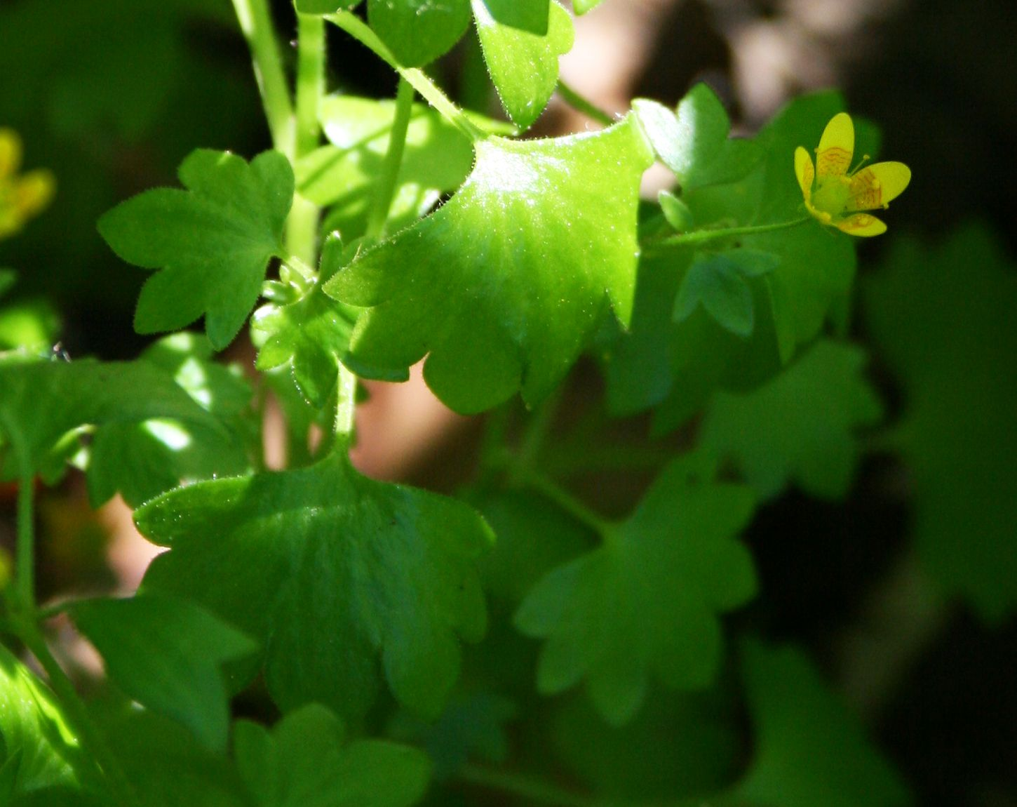 Saxifraga cymbalaria var. cymbalaria, Steinbrechgewächse (Saxifragaceae) - Türkei/Türkiye/Turkey: Prov. Bolu/Bolu ili, Bolu Dağları, Yedigöller-Nationalpark/Yedigöller Millî Parkı, Sazlıgöl